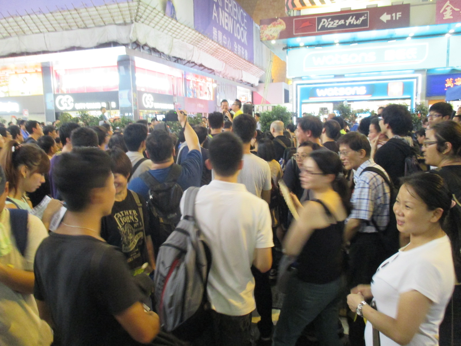 2014年9月30號晚上，快慢必在旺角佔領區開咪。